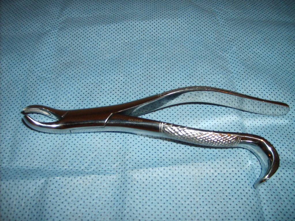 Fórceps n. 18L (left) - utilizado em odontologia